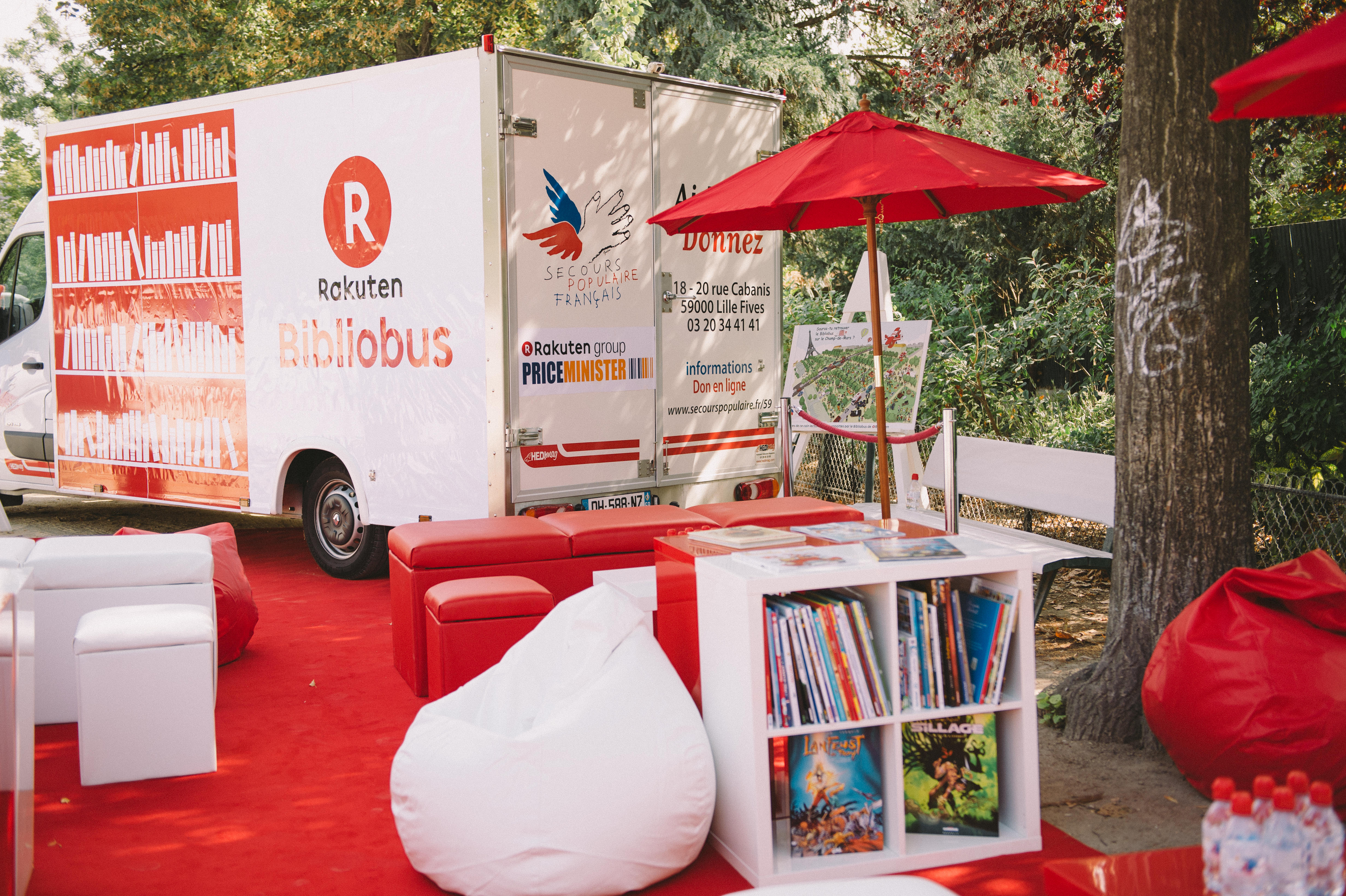 Rakuten s'associe au Secours Populaire Français à l'occasion du 70ème anniversaire de ce dernier en mettant gratuitement à disposition d'enfants en difficulté, un bibliobus contenant plus de 2500 livres en libre service. Le 19 août, Le Secours Populaire rassemblait 70 000 personnes sur le champ de Mars à Paris, à l'occasion de la journée des oubliés des vacances. Un grand moment de partage et de divertissement.